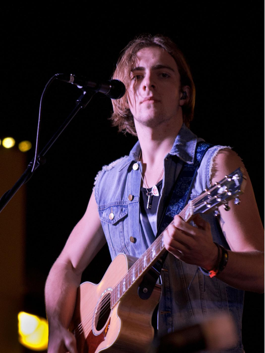 Rocky Lynch en vivo con una guitarra.